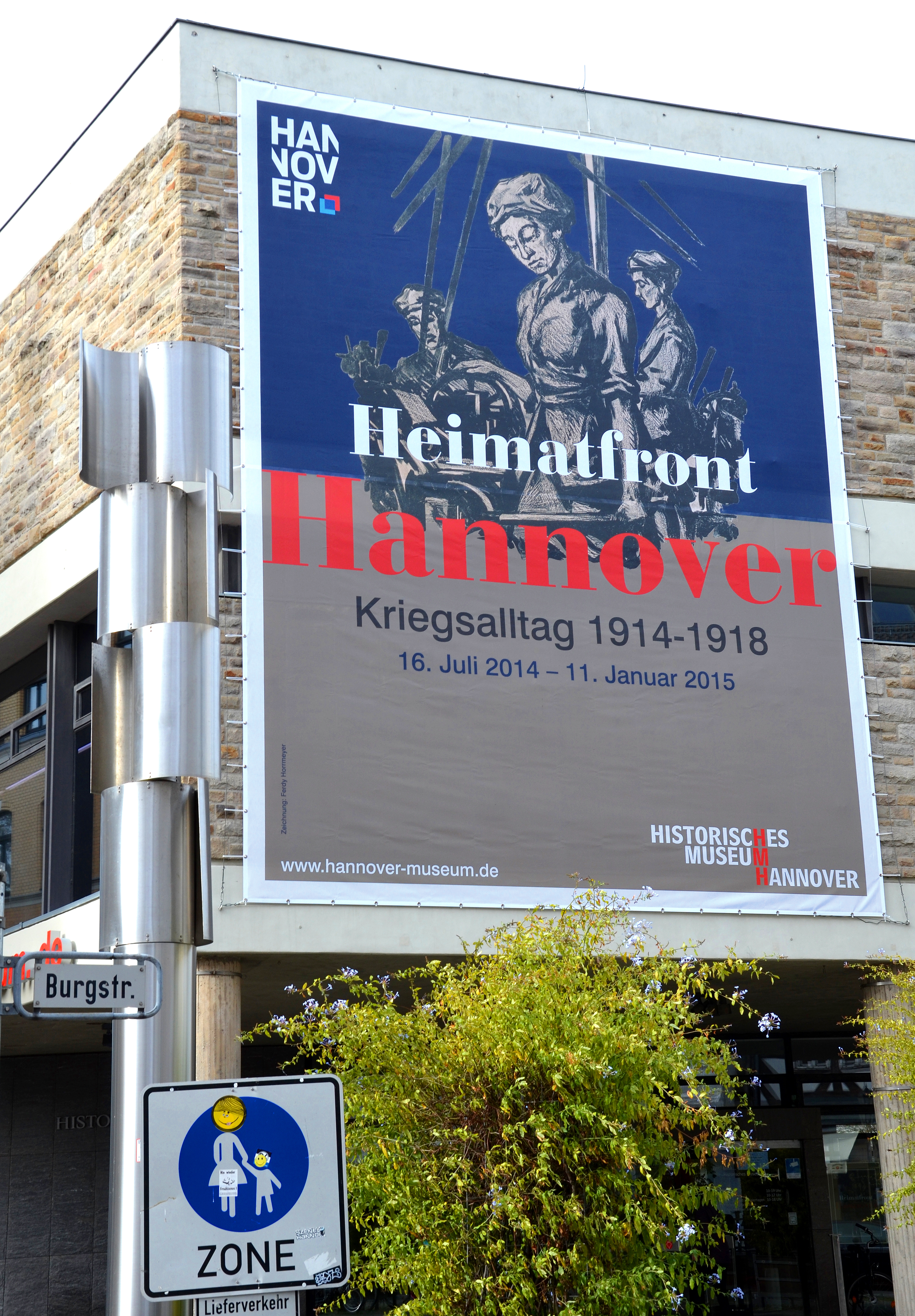 Großtransparent über dem Eingang zum Historischen Museum der niedersächischen Landeshauptstadt zur Ausstellung "Heimatfront Hannover, Kriegsalltag 1914 - 1918" vom 16. Juli 2014 - 11. Januar 2015 ...